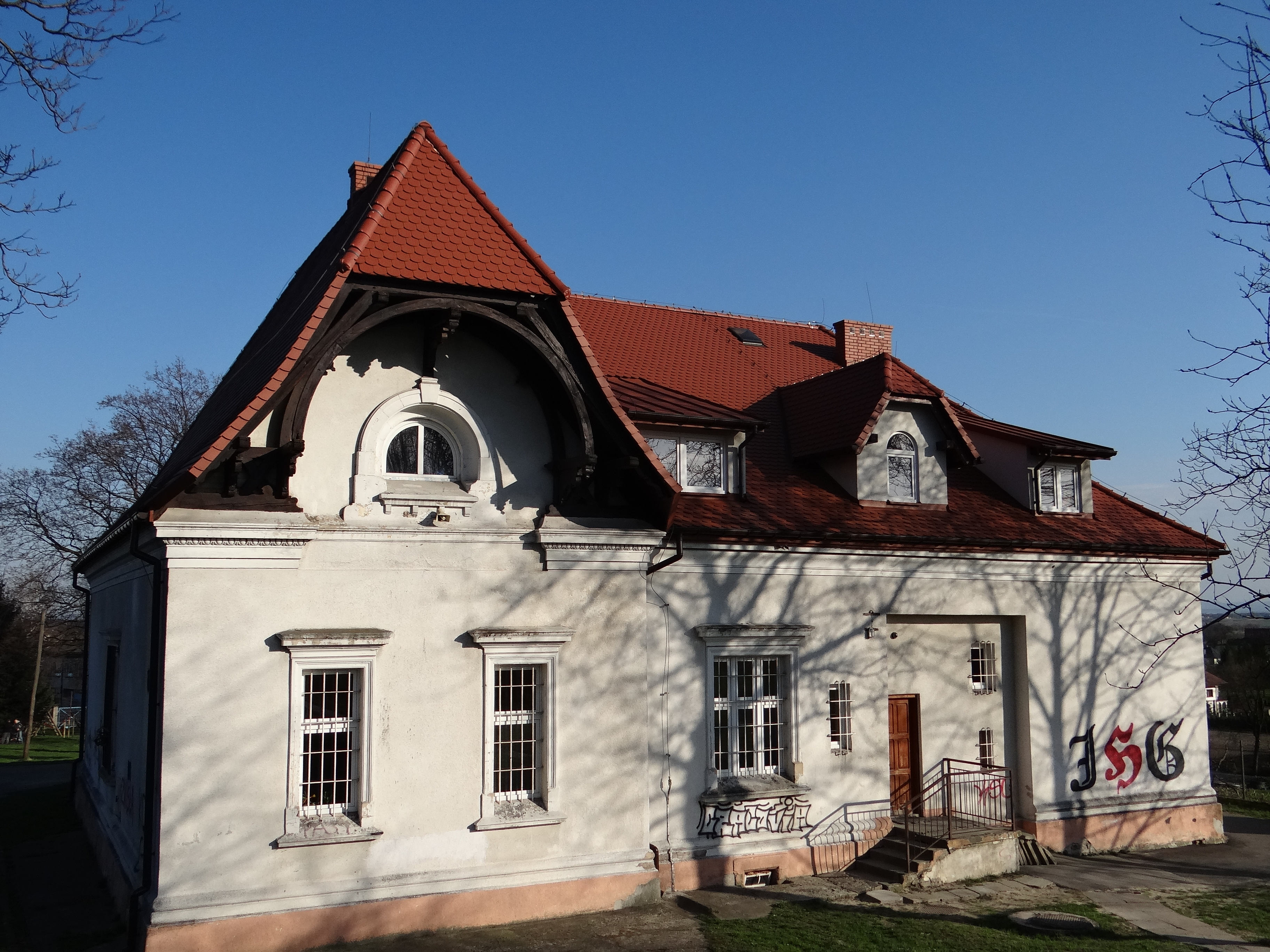 Morawica, dwór, ob. szkoła podstawowa, po 1920